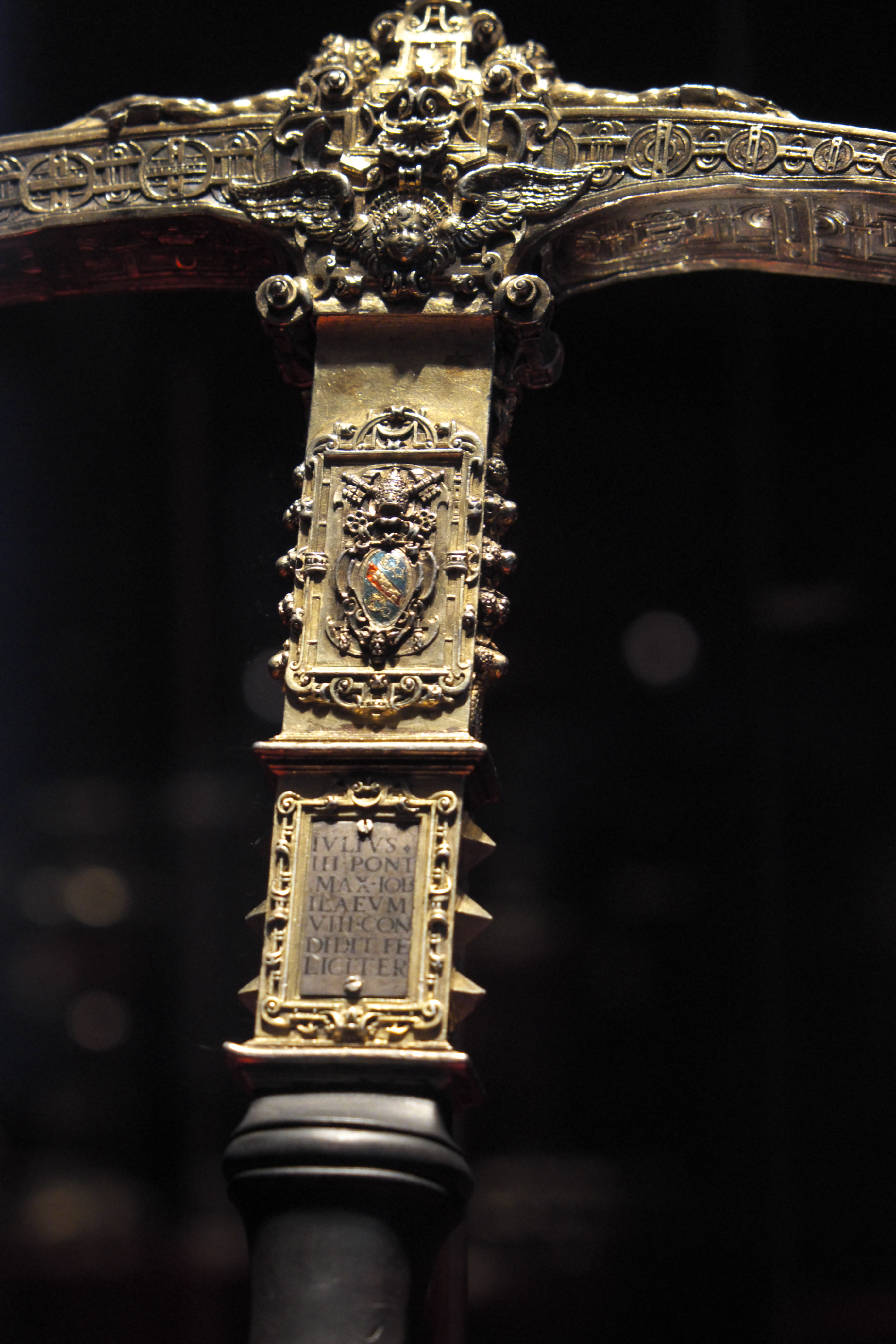 Bayerisches Nationalmuseum in München, Zeremonialhammer von Papst Julius III. zur Öffnung der Heiligen Pforte im Jahr 1550 (Dillinger Hammer)